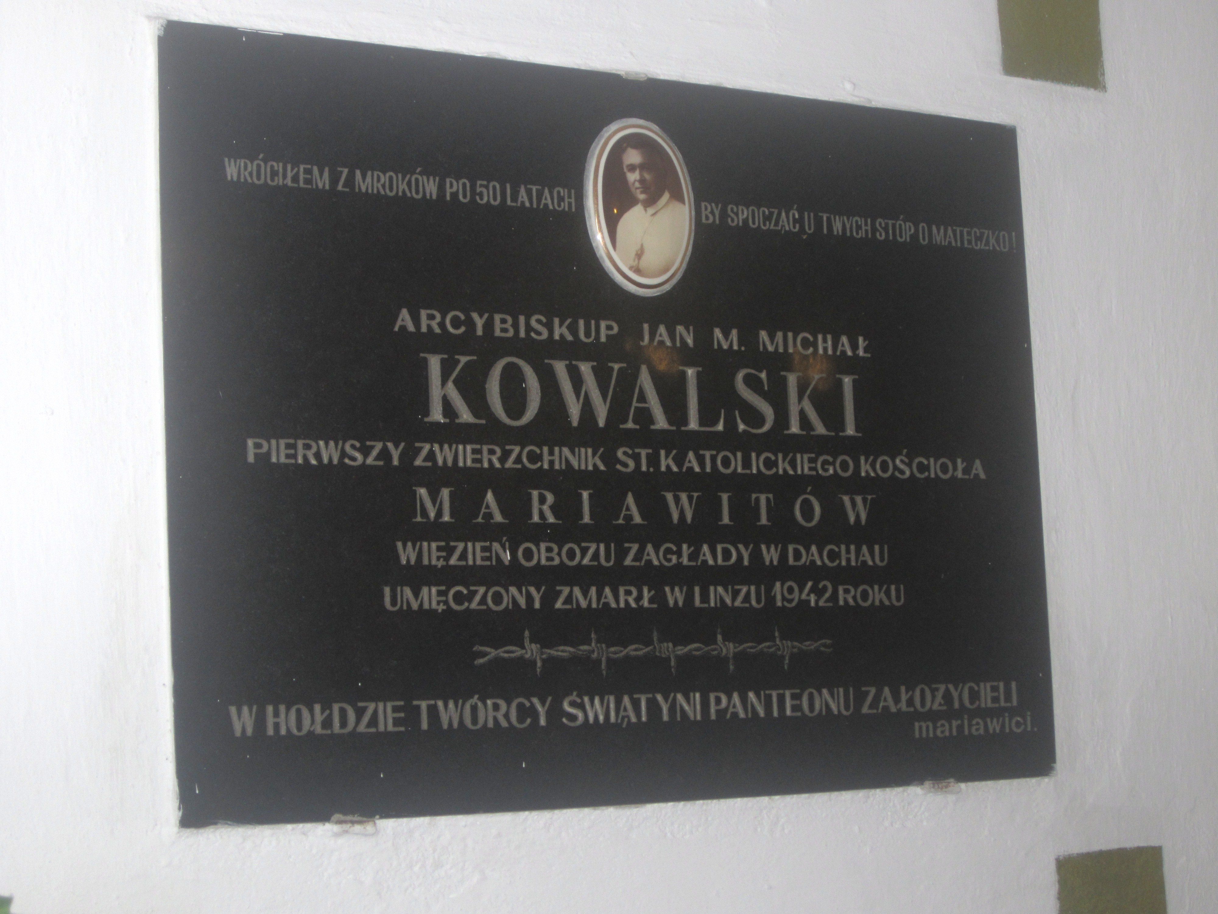 Tablica pamiątkowa abpa. Jana Marii Michała Kowalskiego w podziemiach katedry mariawickiej w Płocku